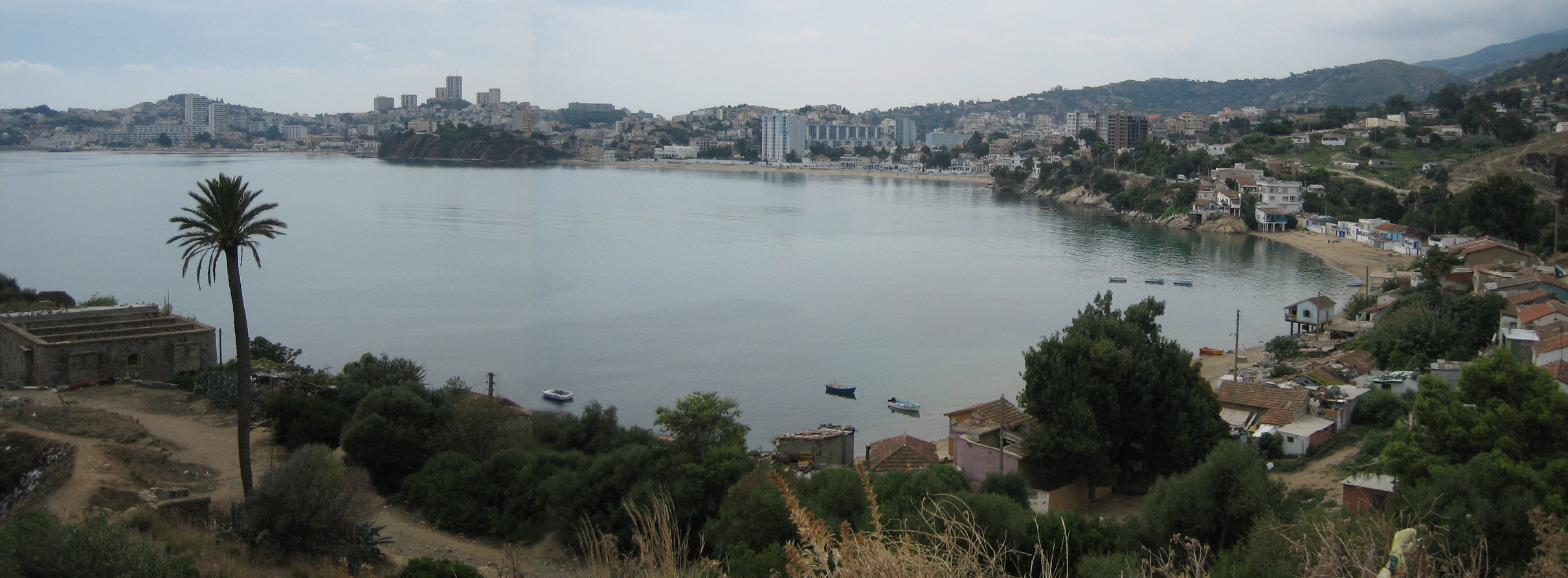 Annaba vue depuis la plage de la courbe sur la baie des corailleurs.